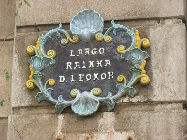 Caldas da Rainha (Portugal) - Queen Leonor square plate